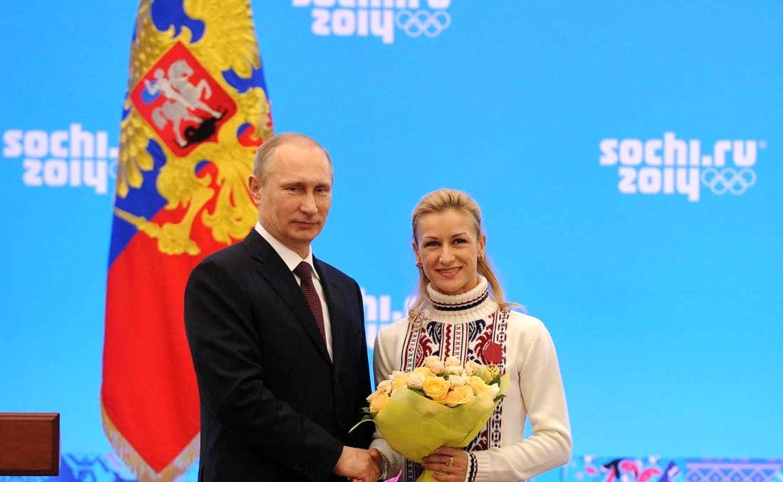 Орденом «За заслуги перед Отечеством» четвёртой степени награждена двукратная олимпийская чемпионка в фигурном катании Татьяна Волосожар.